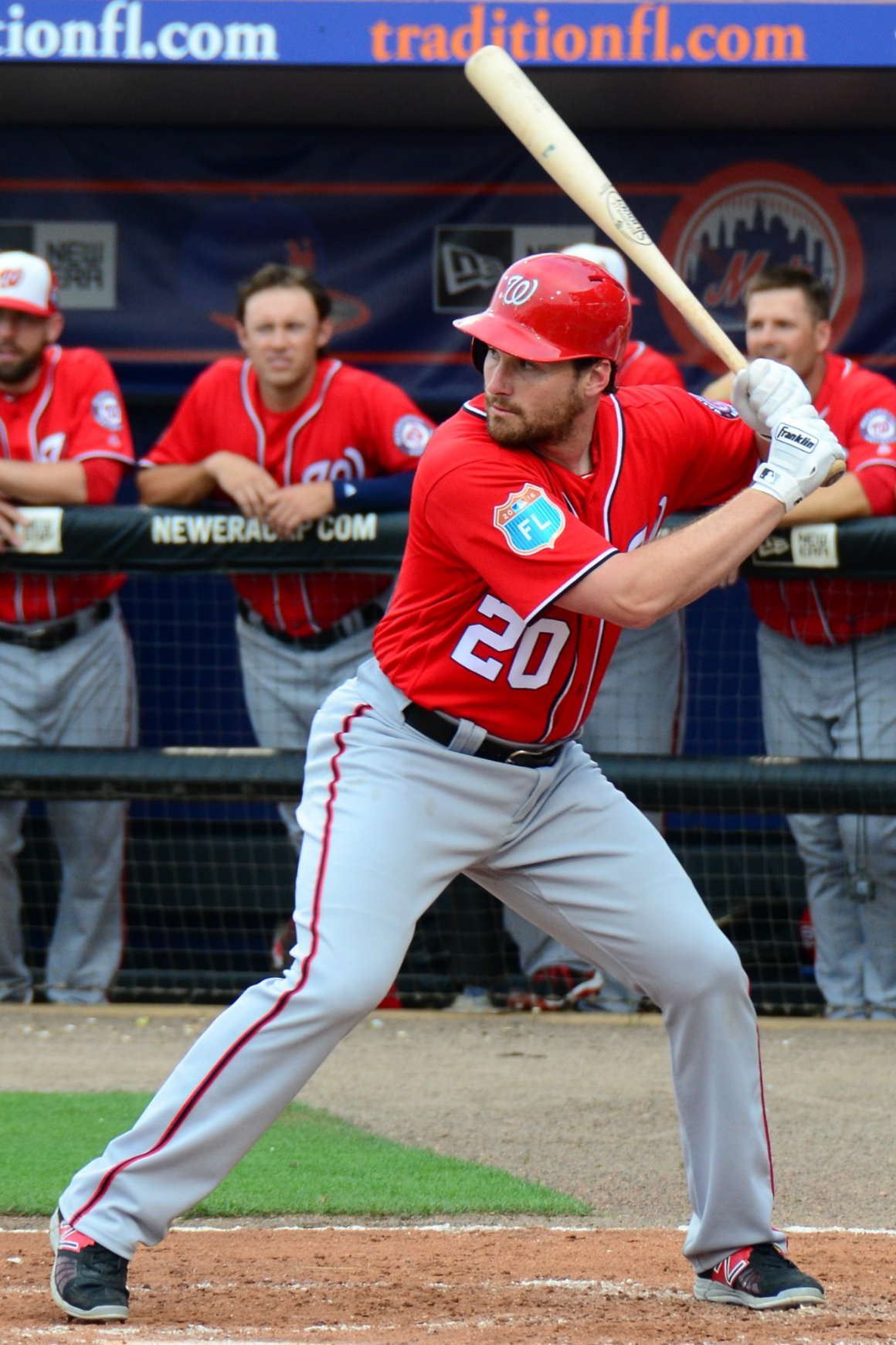 Daniel Murphy